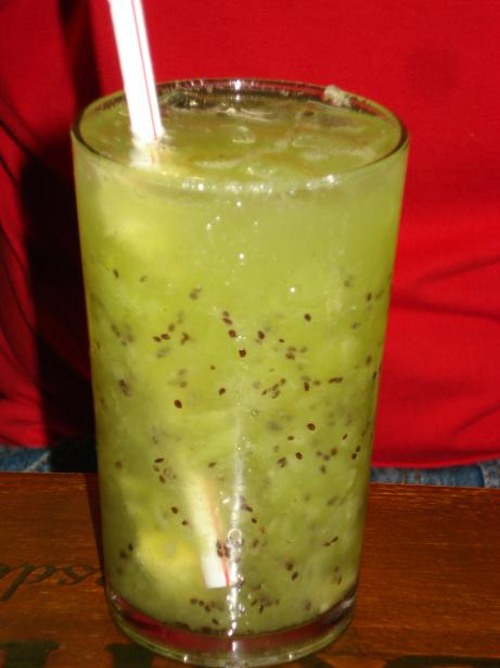 Meu refresco.